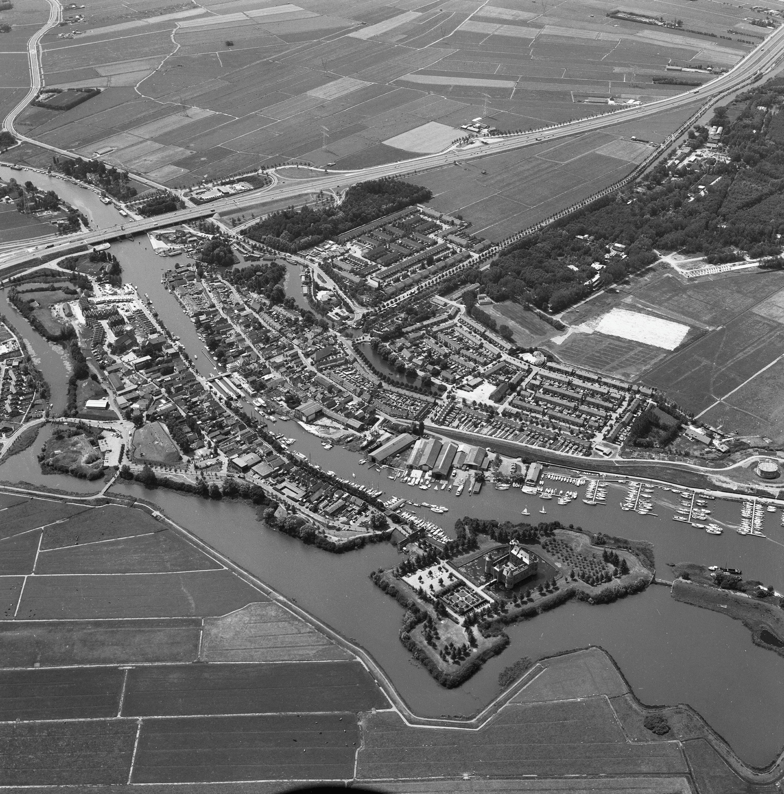 luchtfoto's